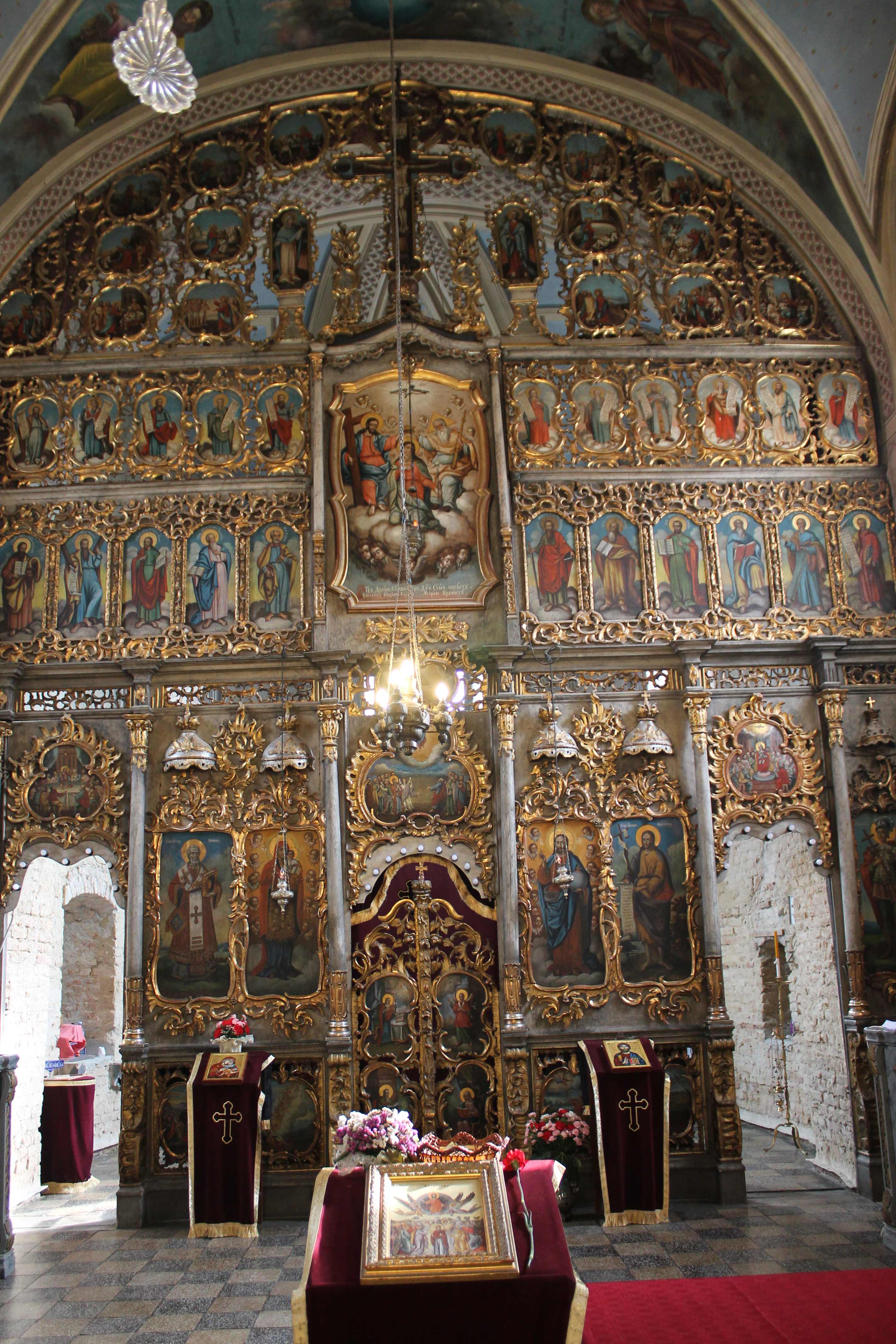 Crkva Vaznesenja Gospodnjeg, Ruma